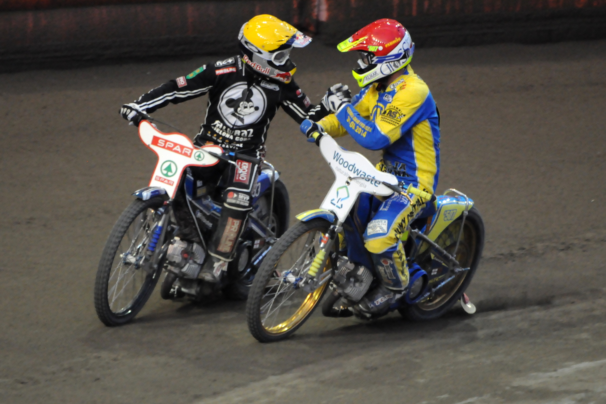 Gorzów Wlkp., 22. 06. 2014 r. Derby nr 84, Jarosław Hampel ( ż ) i Krzysztof Kasprzak ( cz ) dziękują sobie za walkę w 15 biegu ( zwyciężył K. Kasprzak )